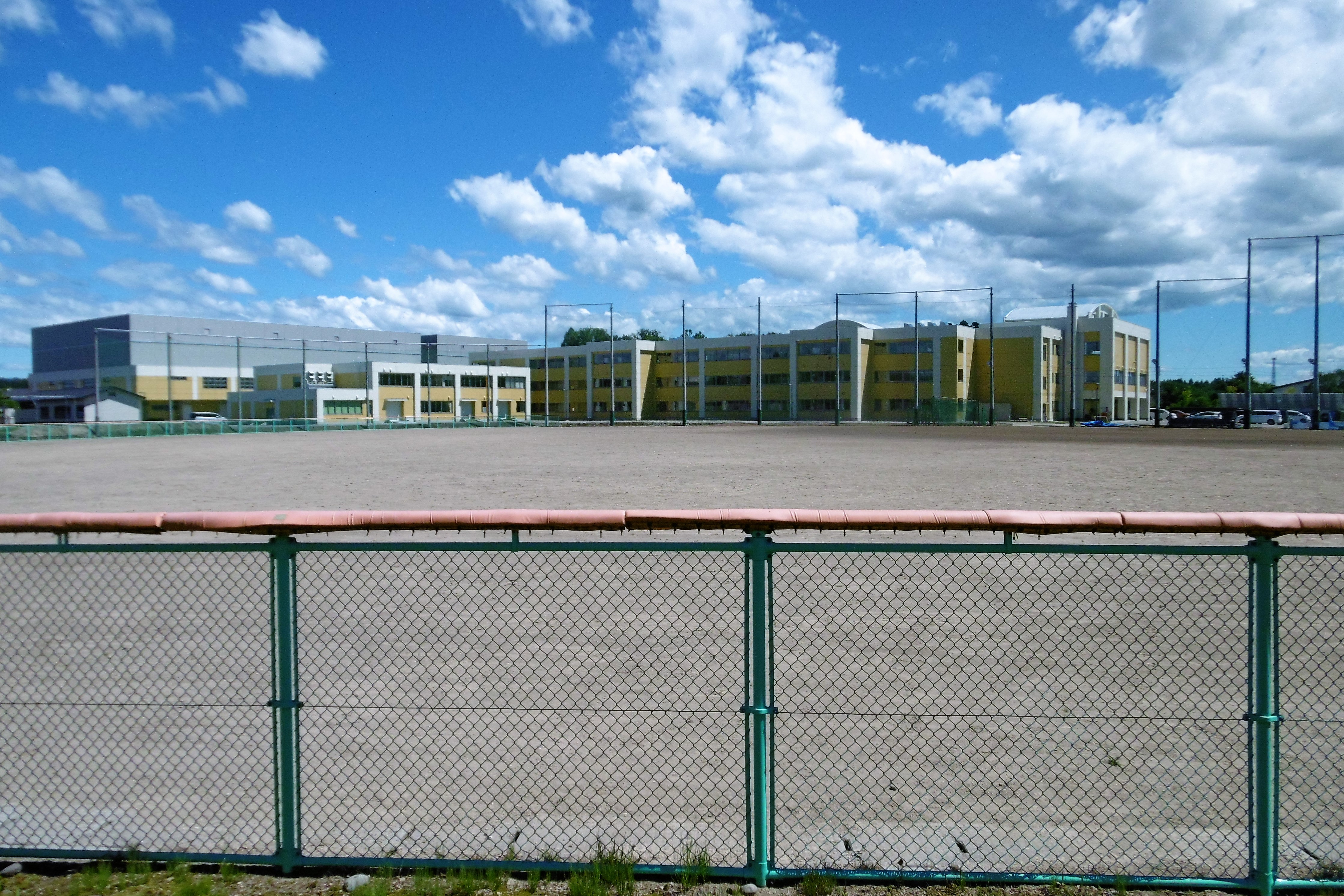 秋田北鷹高校2016：秋田県北秋田市